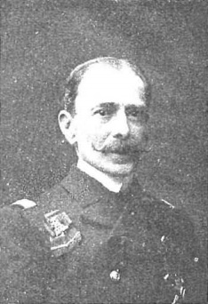 General Sr. Aguirre de Tejada, nuevo Conde de Andino. Fotografía de Christian Franzen.